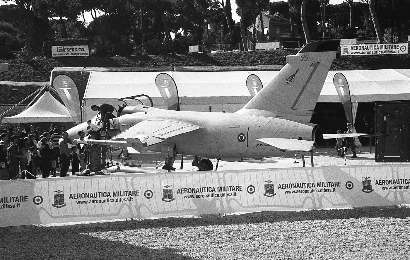 AMX esposto al Circo Massimo per la festa della Forze Armate 2011